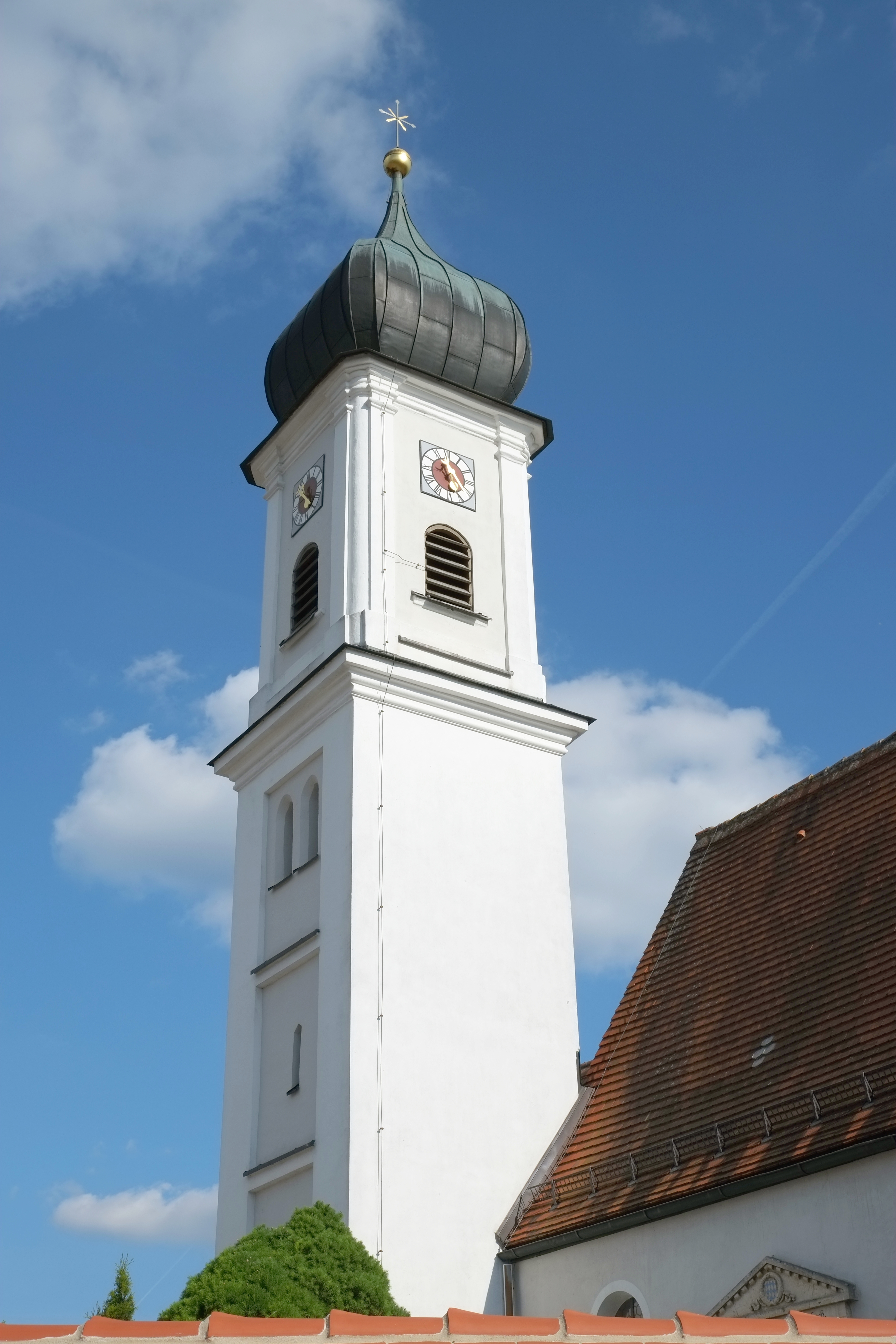 Kirche St. Nikolaus in Sainbach im Landkreis Aichach-Friedberg (Bayern, Deutschland)